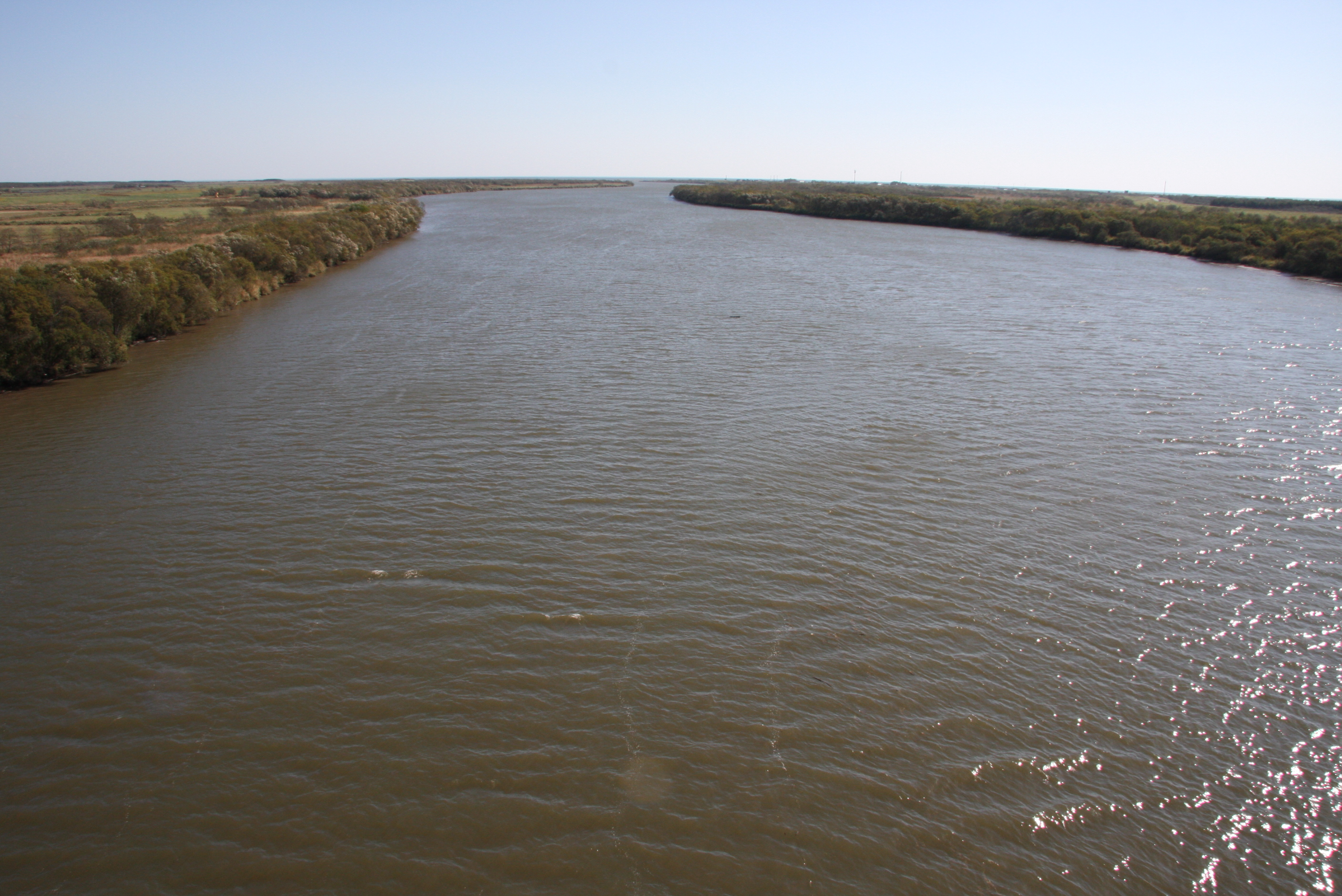 十勝川 十勝河口橋より下流